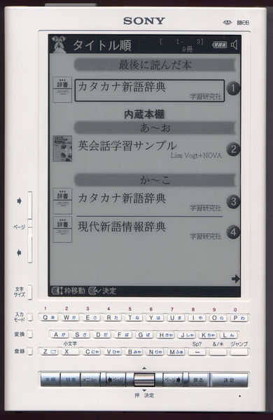 Czytnik Sony LIBRIé EBR-1000